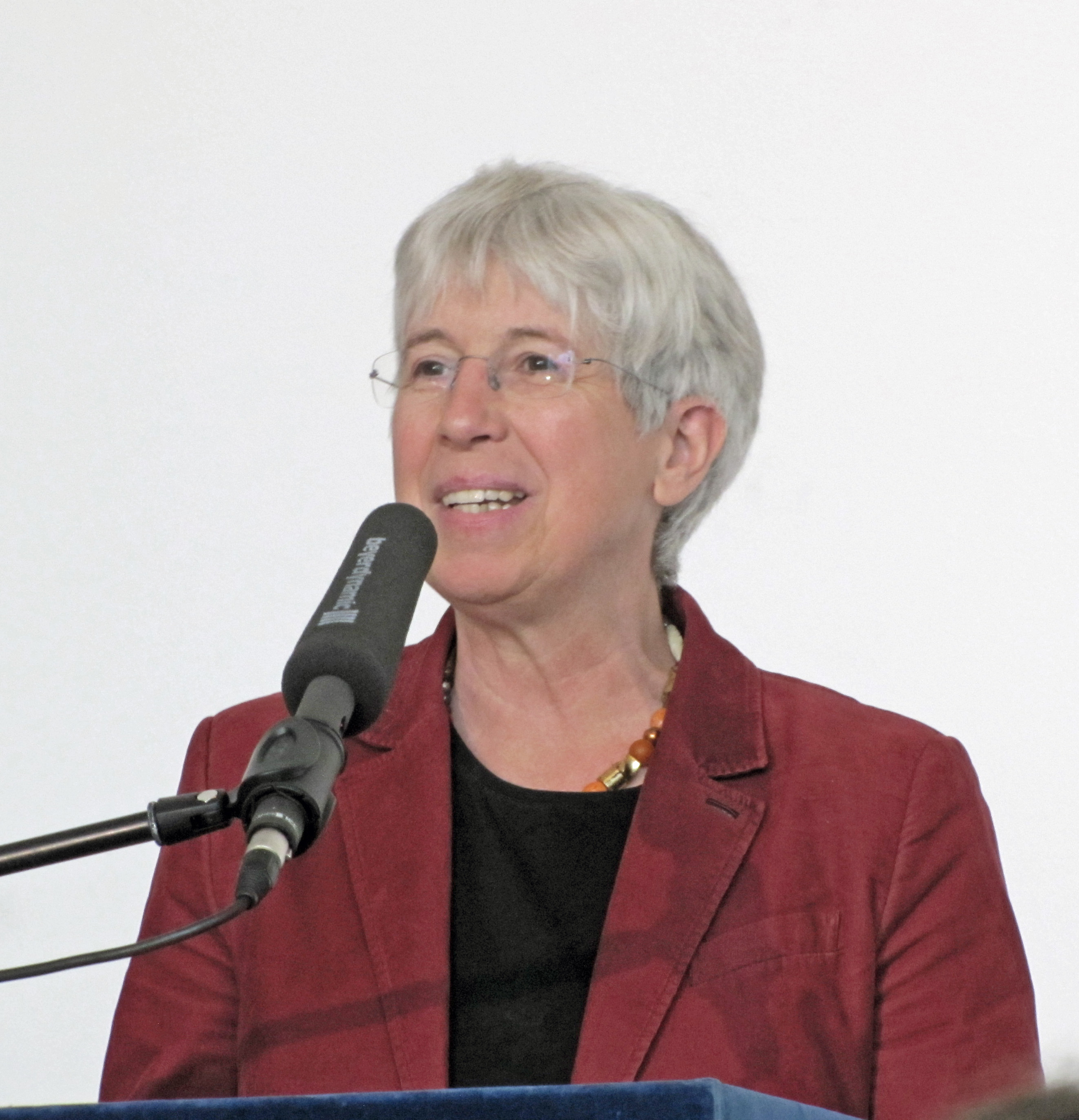 Gudrun Krämer, Islamwissenschaftlerin, FU Berlin. Vortrag: "Passt der Islam in die säkulare Moderne?"